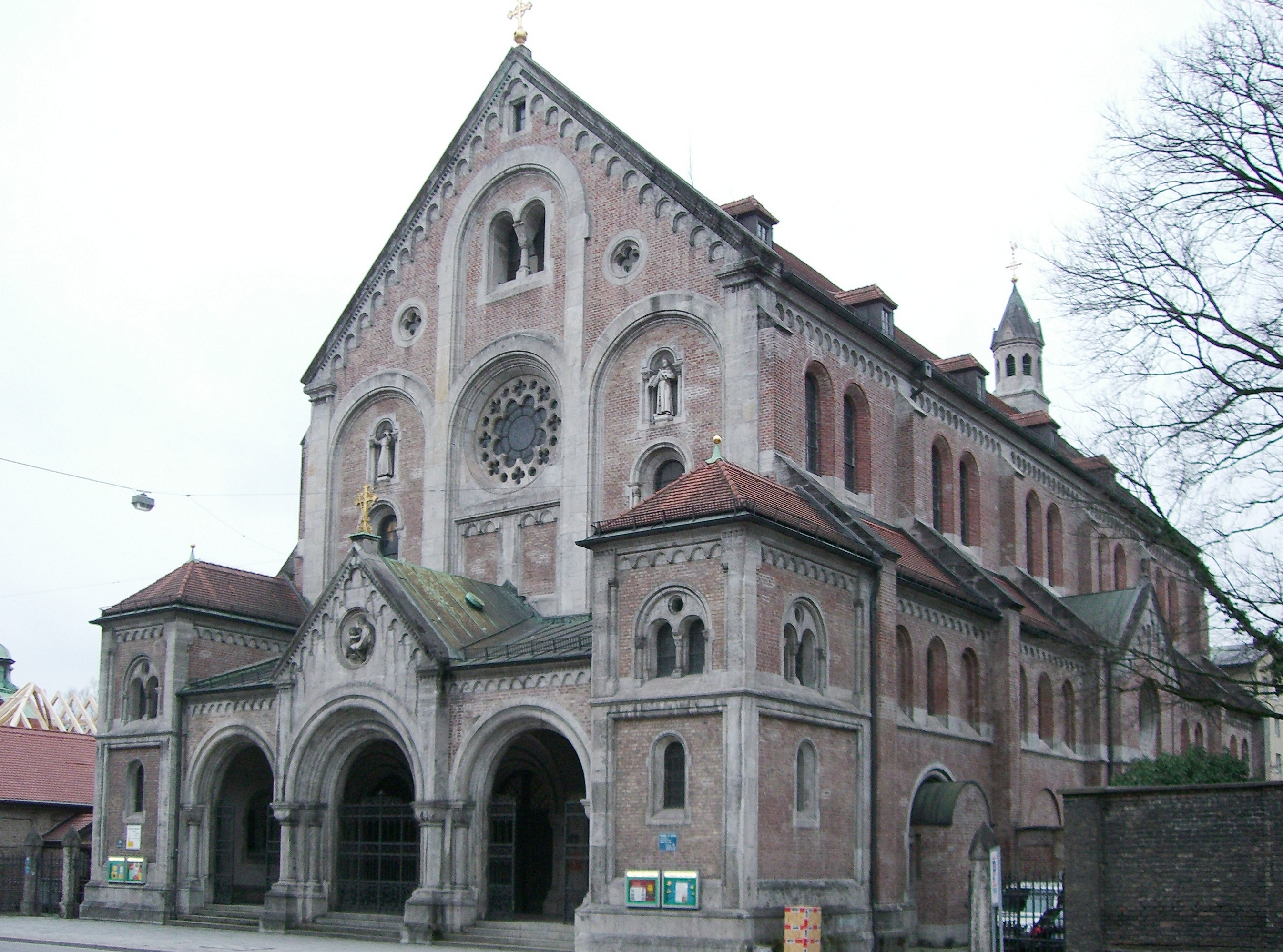 Description: München: St. Anton *Source: Maximilian Dörrbecker (Chumwa)